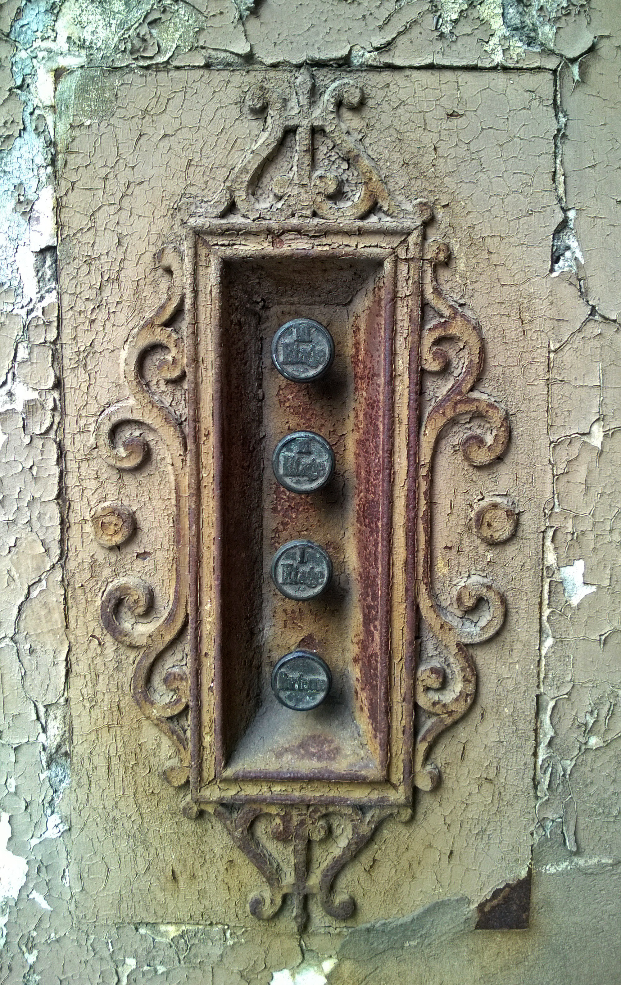 Klingel an bisher unsaniertem Haus in der Görlitzer Luisenstraße